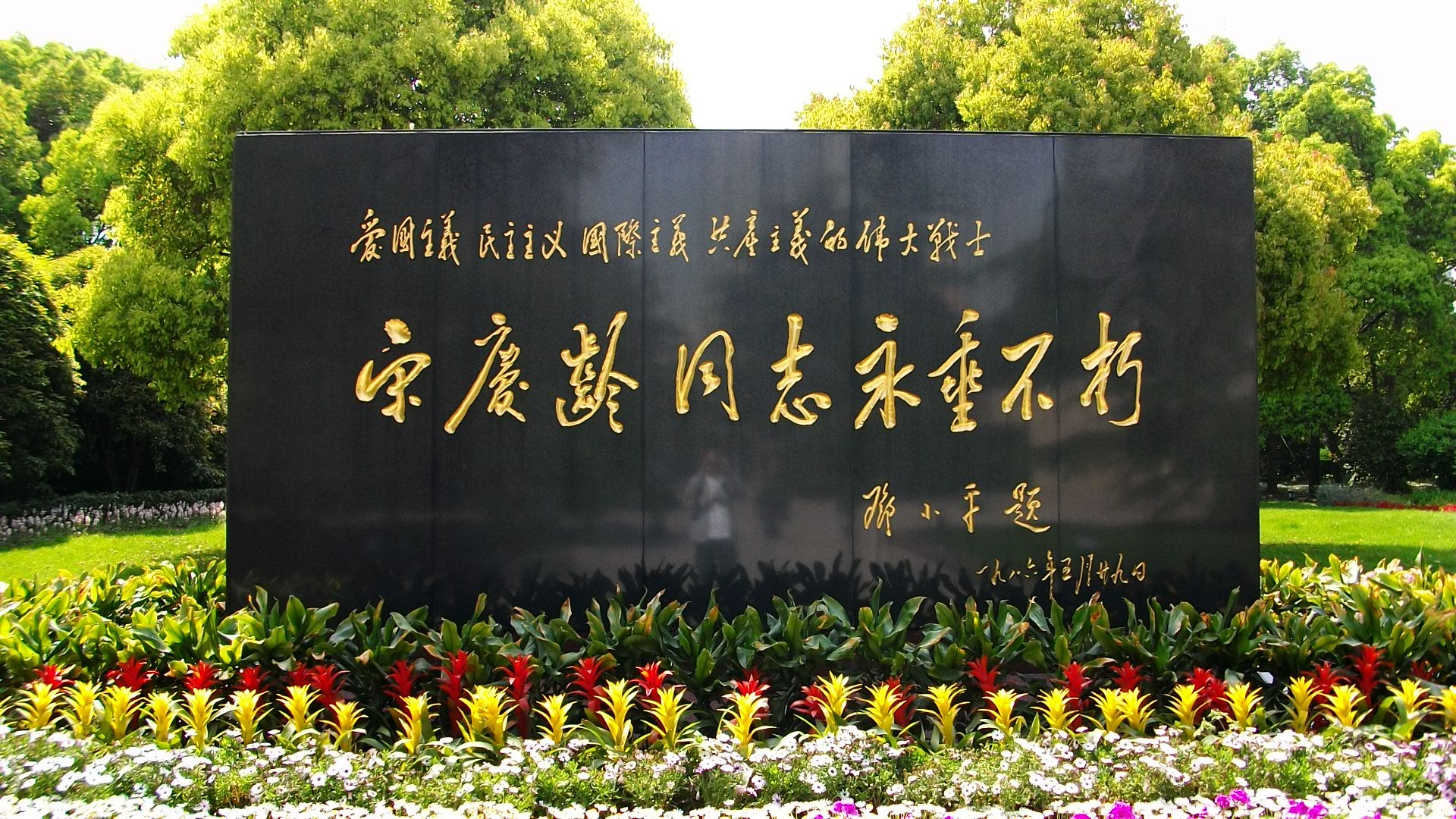 中文（中国大陆）: 宋庆龄陵园内邓小平的题字。